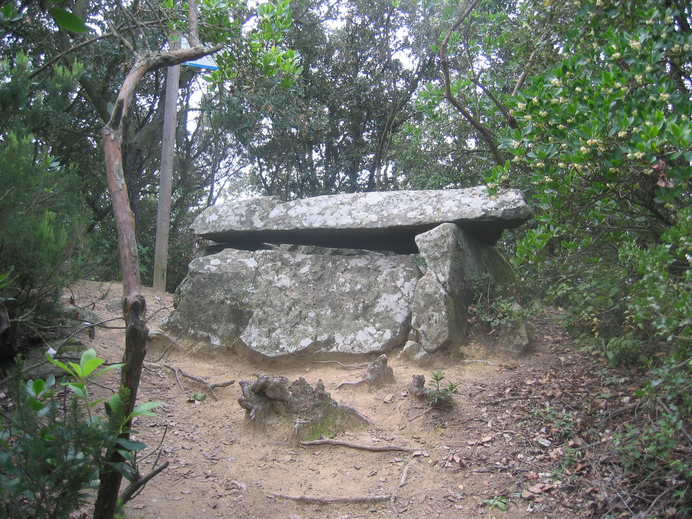 Dolmen de Castellruf, a Santa Maria de Martorelles (Vallès Oriental).